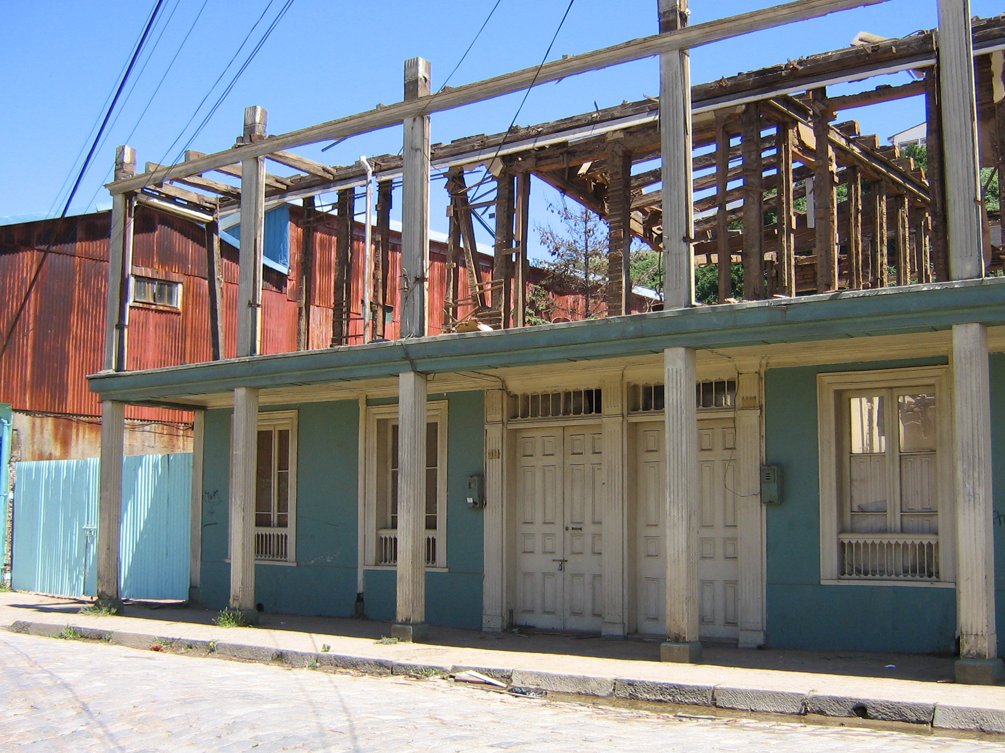 Estado Actual de la Casa Hinrischsen, donde vivió el teniente de la Covadonga, Ignacio Serrano